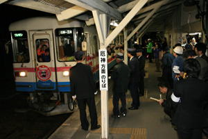 出典は、稲継泰朗による。鉄道部長の許可を得て、1番線ホームから撮影。神戸新聞記者の隣で撮影。神戸新聞記者の確認で、22時52分着確認。鉄道部長も同時刻確認。朝日新聞、毎日新聞、讀賣新聞、各記者共に、同時刻確認。なお、新聞記事には、掲載されず。22時52分、9分遅れの最終列車の到着。最後の雄姿をフィルムにおさめますが、涙が出てきました。言葉になりません。